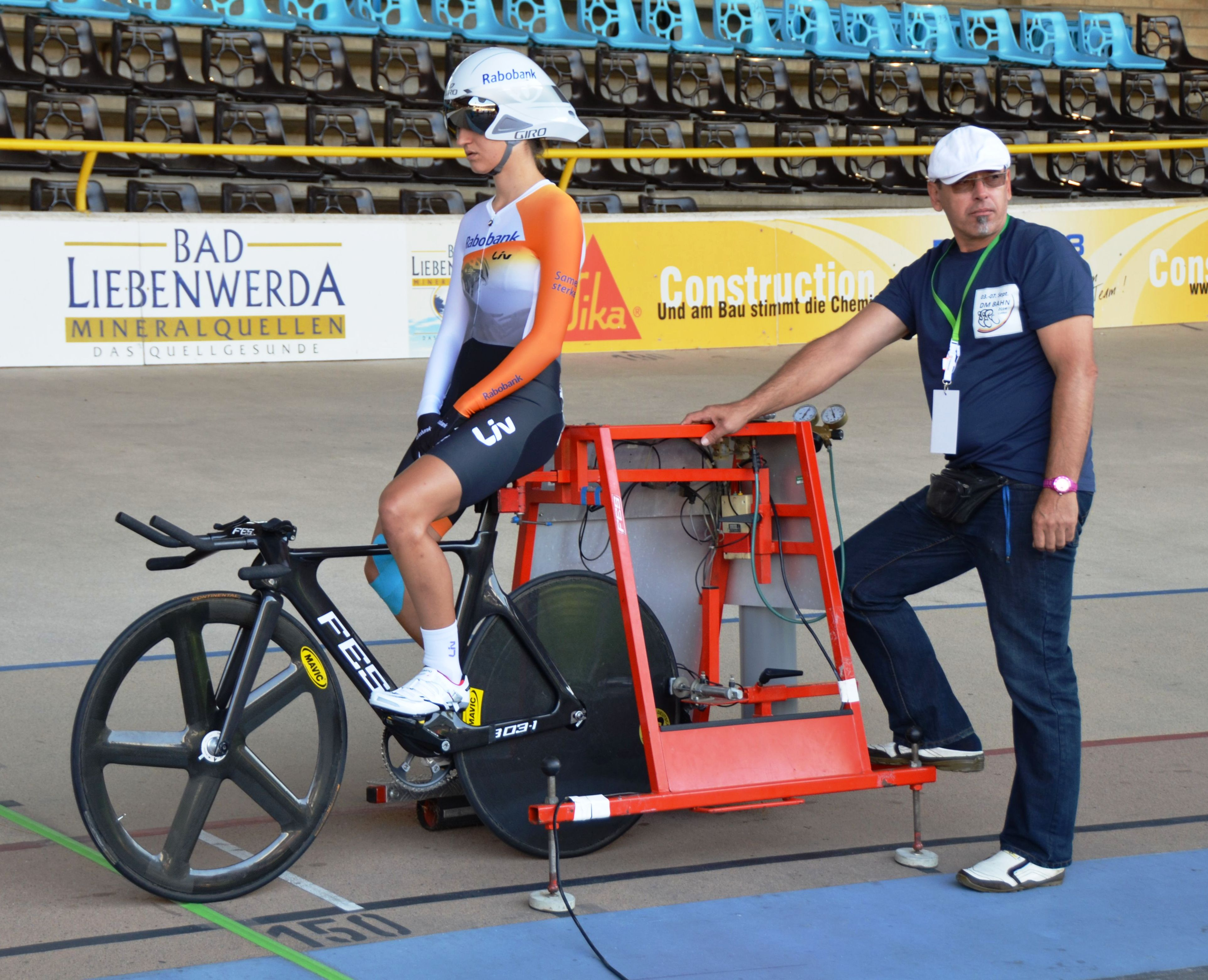 Anna Knauer, deutsche Radsportlerin The making of this document was supported by the Community-Budget of Wikimedia Germany.